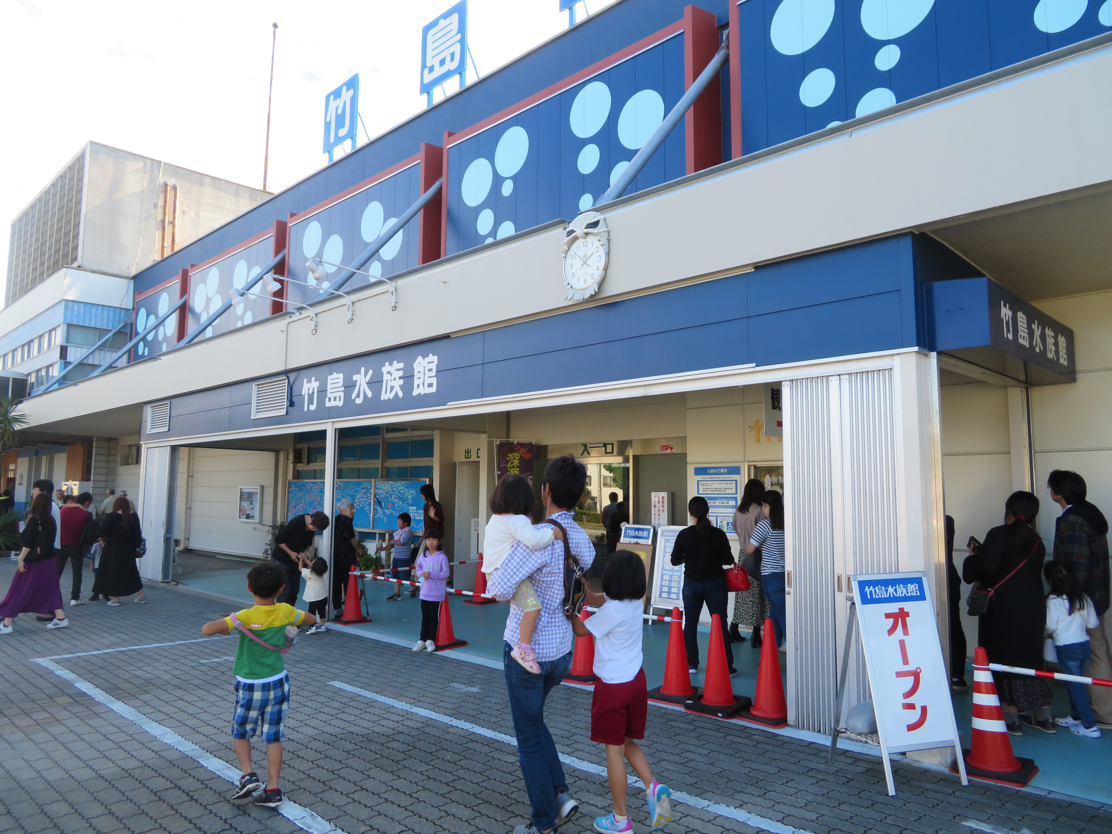 竹島水族館（蒲郡市竹島町）